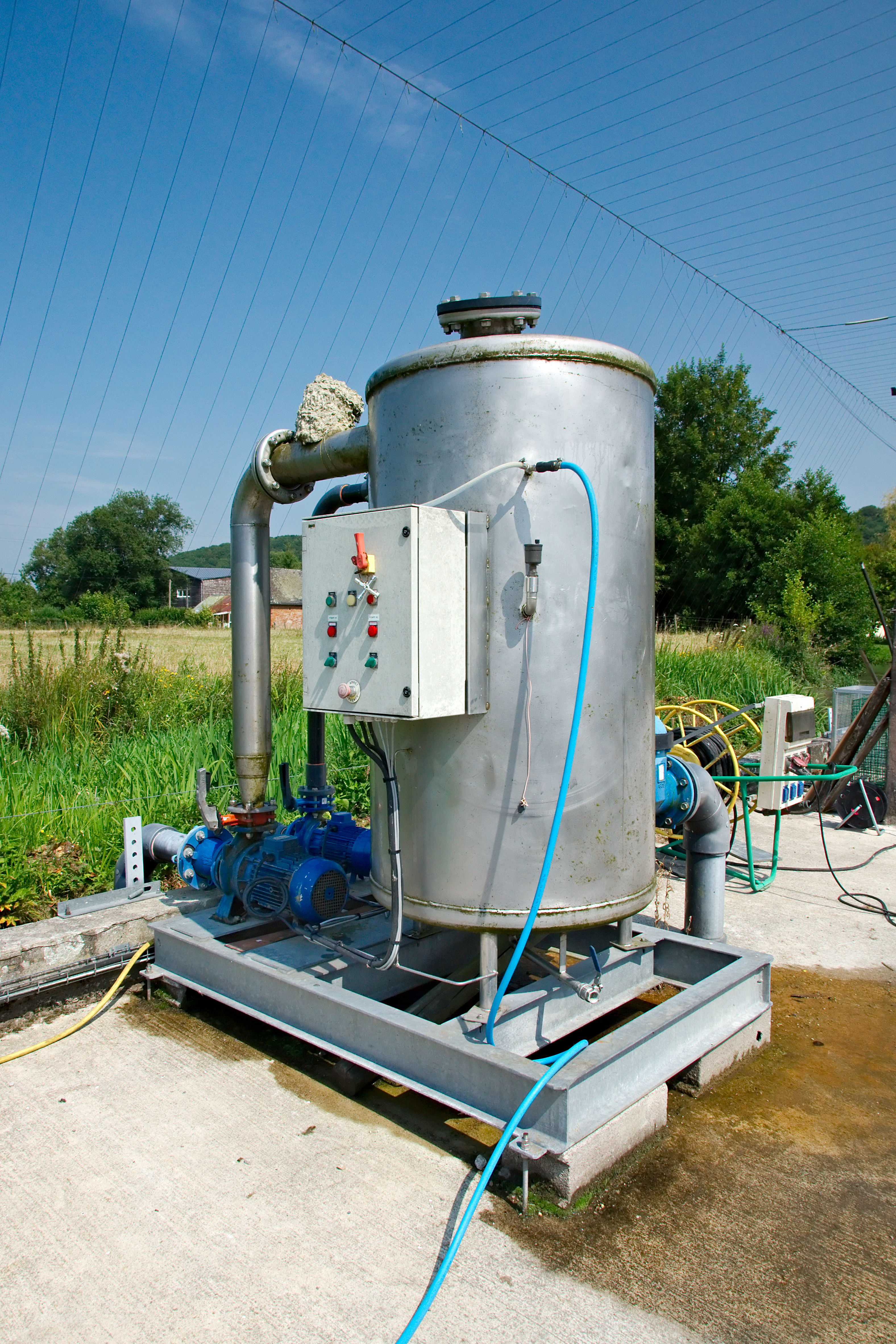 Dispositif d’oxygénation de la pisciculture de la Calonne. L’eau est récupérée par les pompes (en bleu) et mélangée à l’oxygène fourni par le petit tuyau bleu